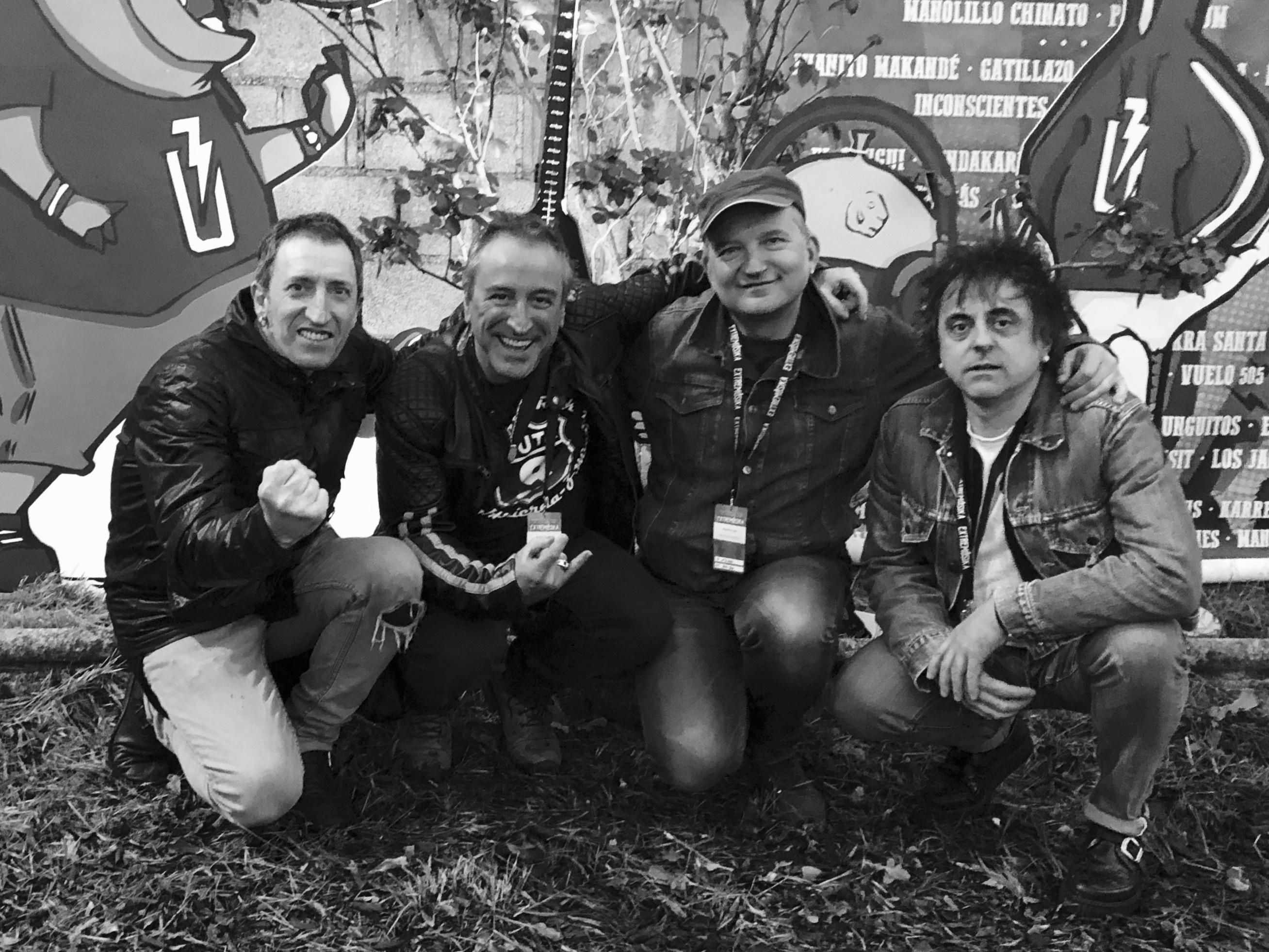 La banda de punk rock Parabellum en 2018, antes de tocar el el Festival Extremusika (Cáceres), con la formación actual. De izquierda a derecha: Josu Korkostegi, Iñaki Setien, Lino Prieto, Pedro de la Osa.